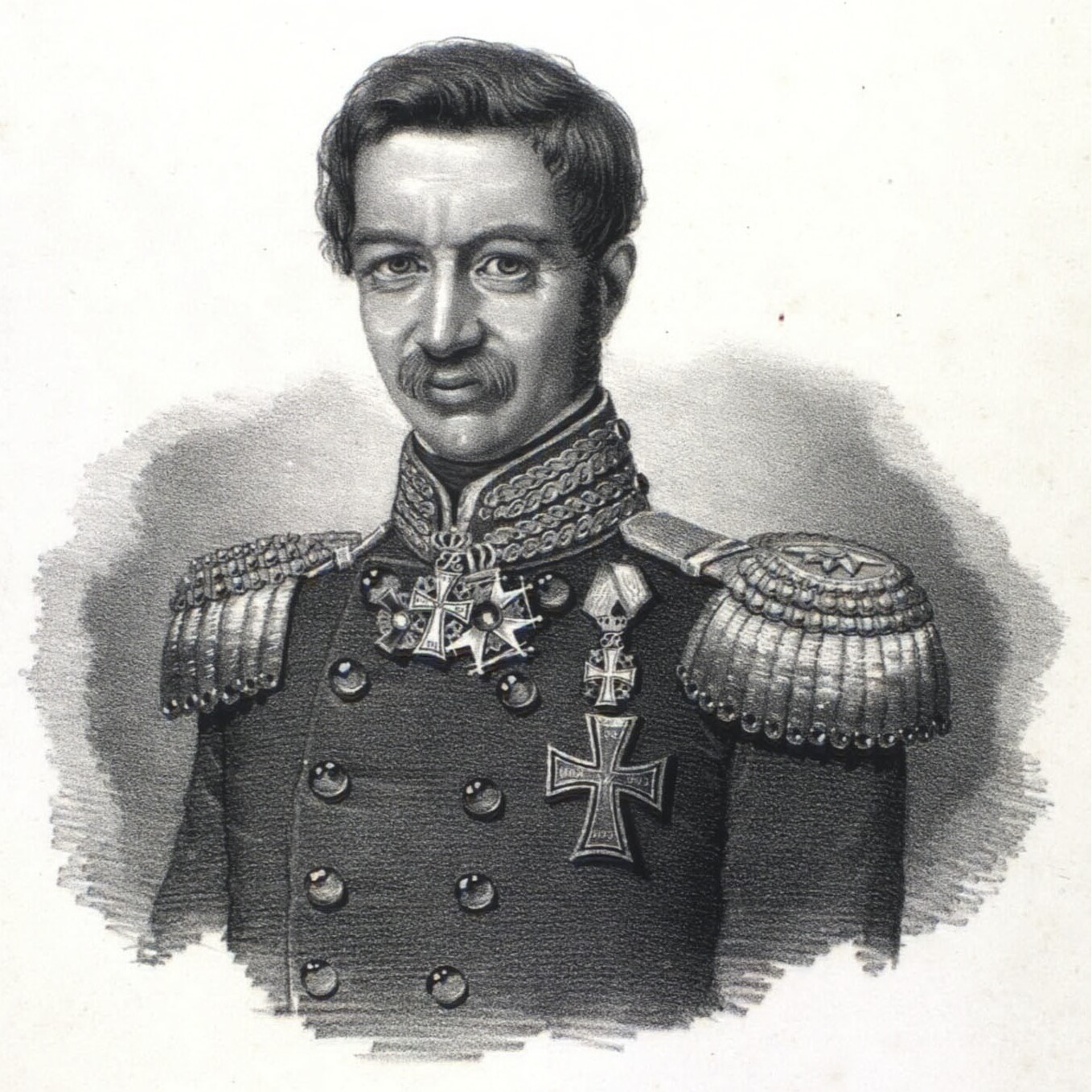 Oberstløjtnant Carl Julius Flensborg. 1804-1852.